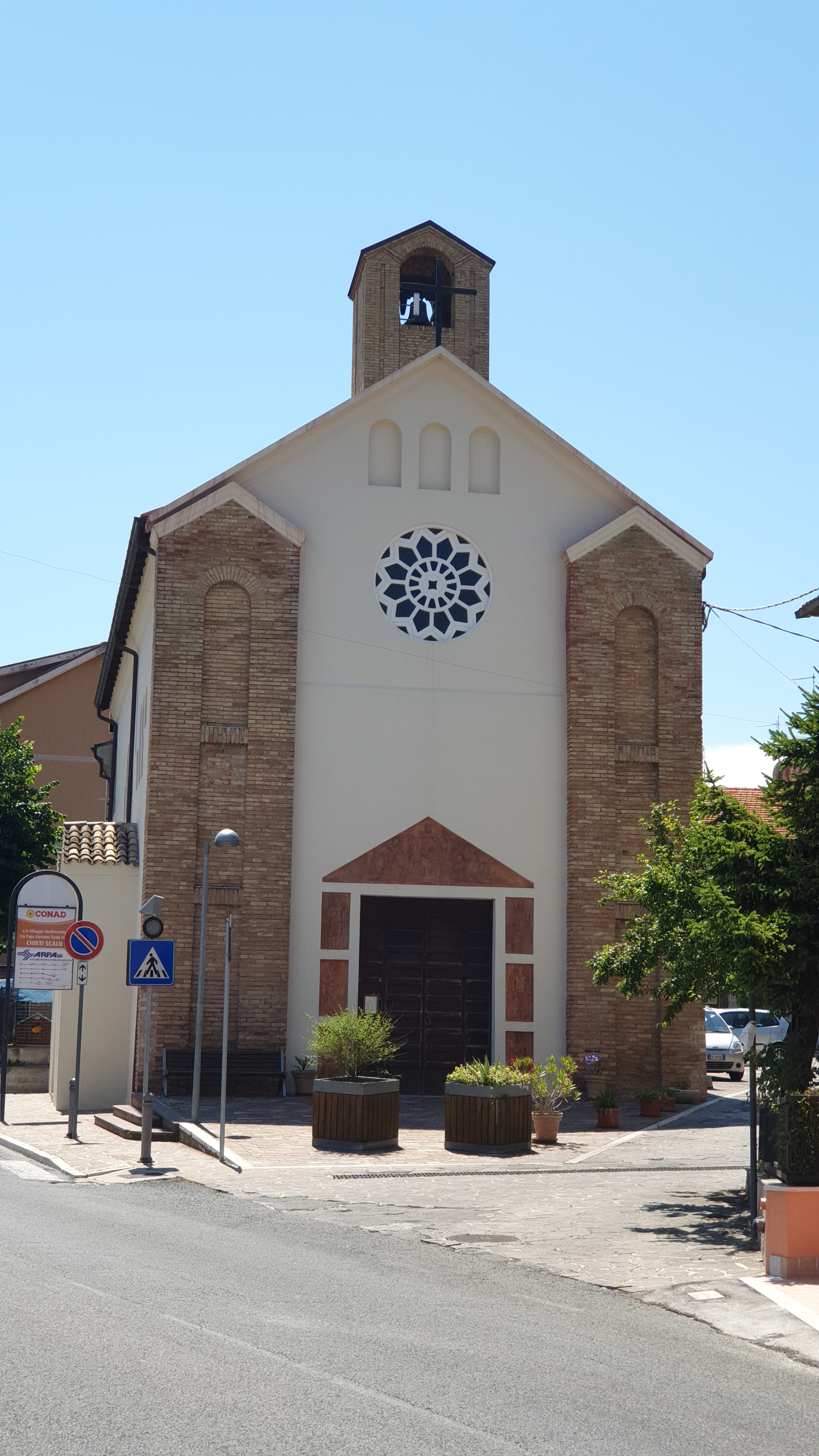 Villanova - Chiesa di San Nicola di Bari